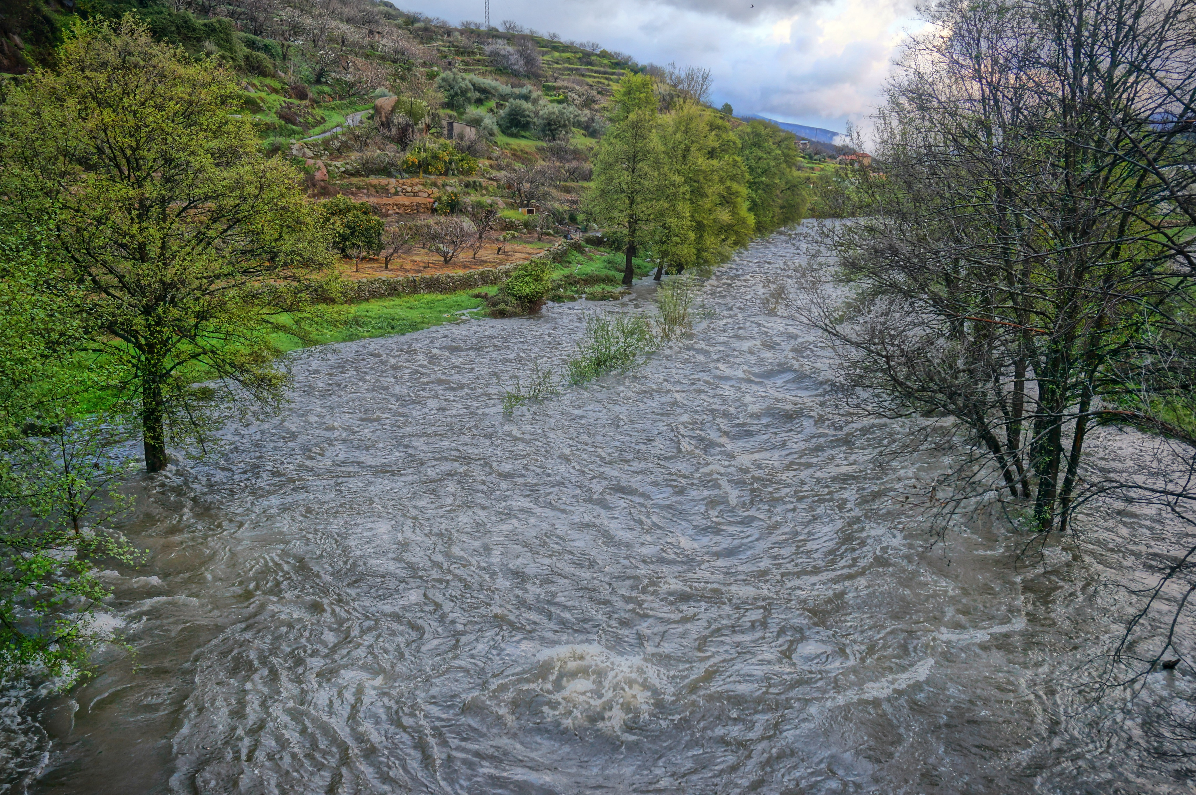 Agua en Navaconcejo, provincia de Cáceres, España